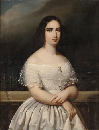 Cäcilie, Großherzogin von Oldenburg, geb. Prinzessin von Schweden